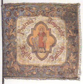 Schulfahne